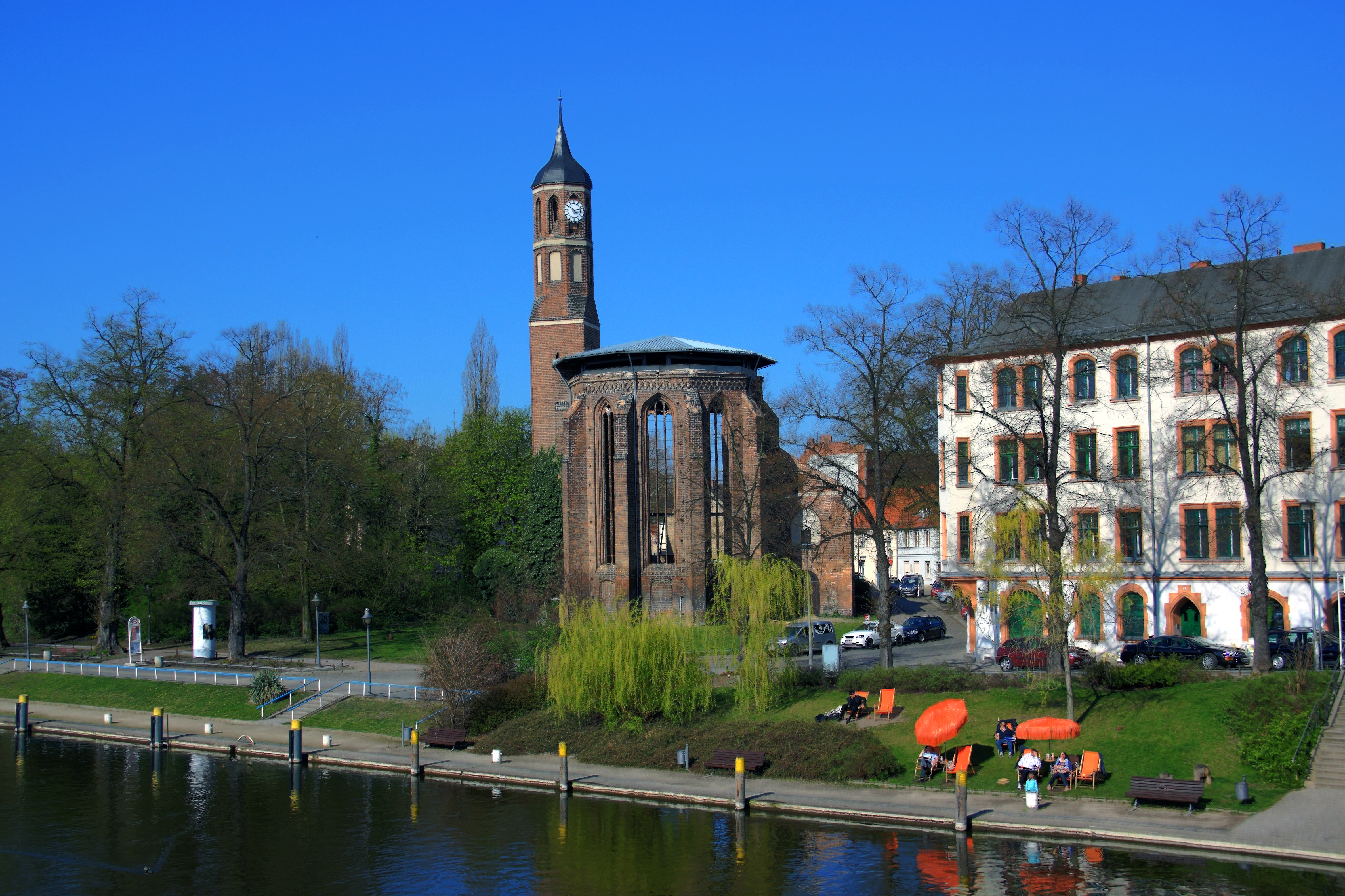 St. Johannes Brandenburg/Havel